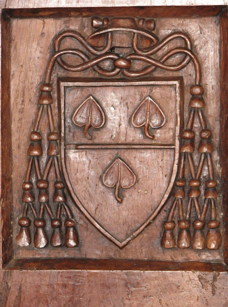 Eroli Berardo Stemma Coro San Giovenale Narni